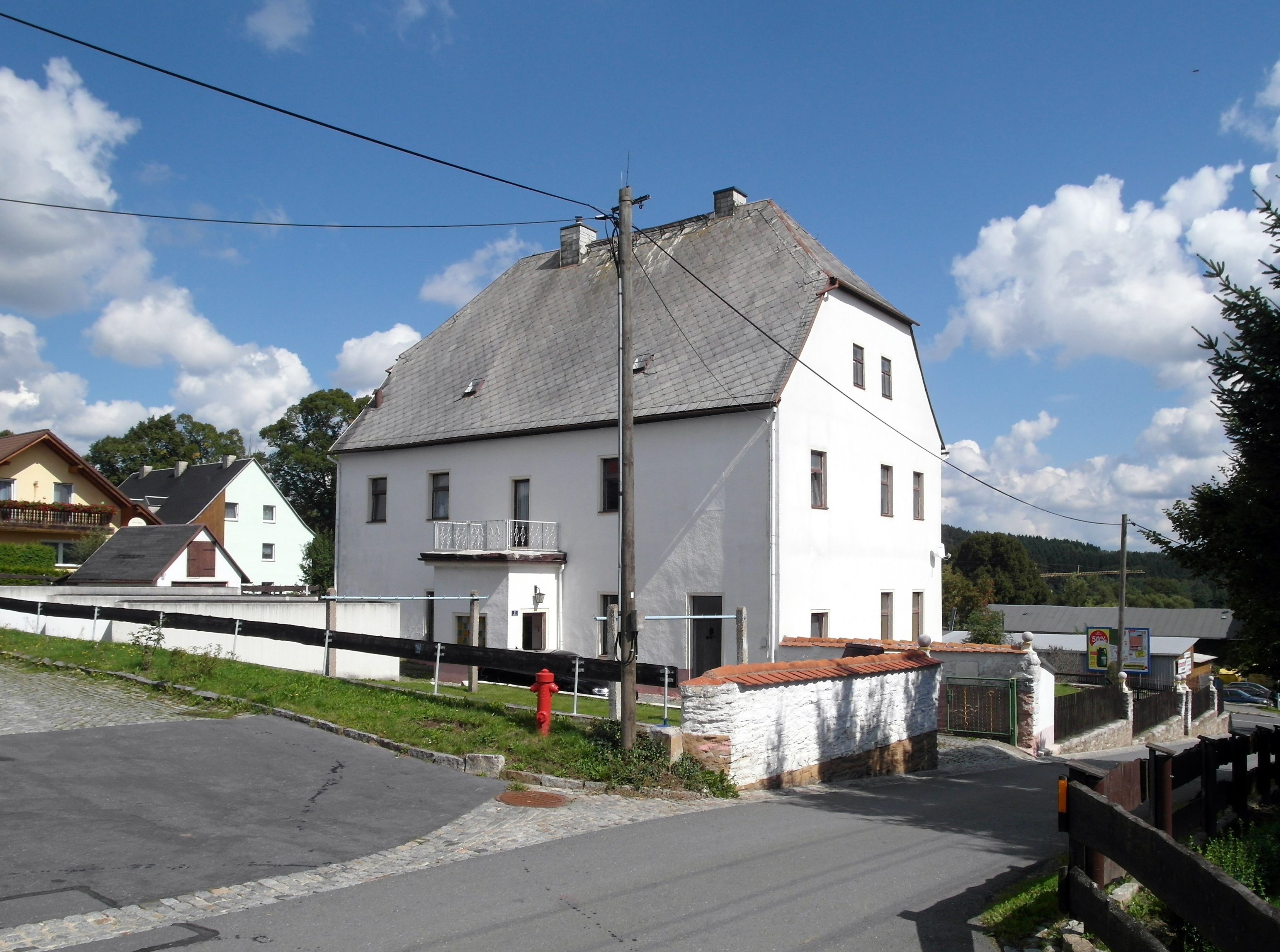 04.09.2017 09488 Schönfeld (Thermalbad Wiesenbad): Sicht von Süden zum Herrenhaus des einstigen Rittergutes, Alleeweg 2 (GMP: 50.619640,12.980441). [SAM1690.JPG]20170827315DR.JPG(c)Blobelt